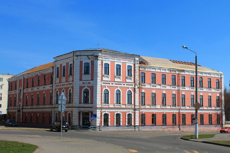 Фельчарская школа. Магілёў